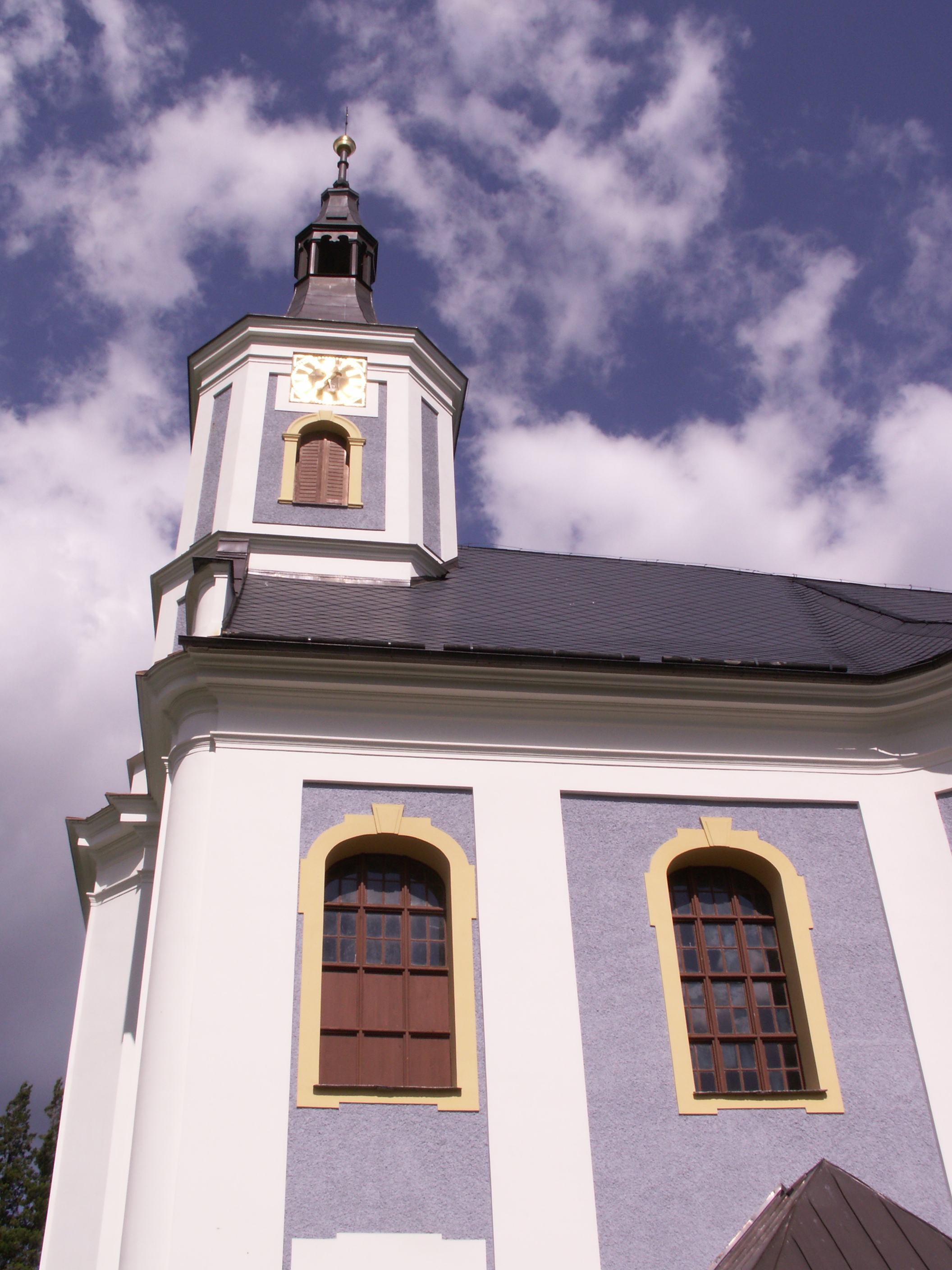 Janov (okres Bruntál), kostel Nejsvětější Trojice